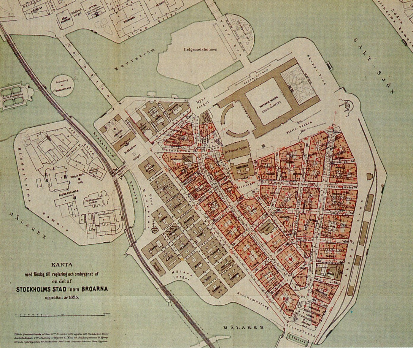 Förslag till reglering av Gamla stan 1895, enligt ett förslag av Herman Ygberg (1844-1917)